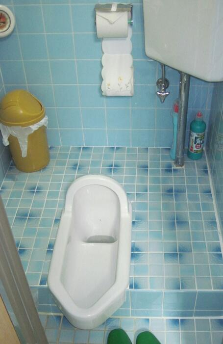 TOTO C75A+S570